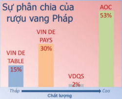 Phan chia cua ruou vang Phap